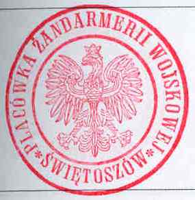 Odcisk pieczęci urzędowej Placówki Żandarmerii Wojskowej w Świętoszowie, wypukłej do tuszu, okrągłej o średnicy 36 mm, kauczukowej, z wizerunkiem orła oraz nazwą jednostki wojskowej, przeznaczona do nadawania świadectwa wiarygodności pisma lub dokumentu, na którym została umieszczona.